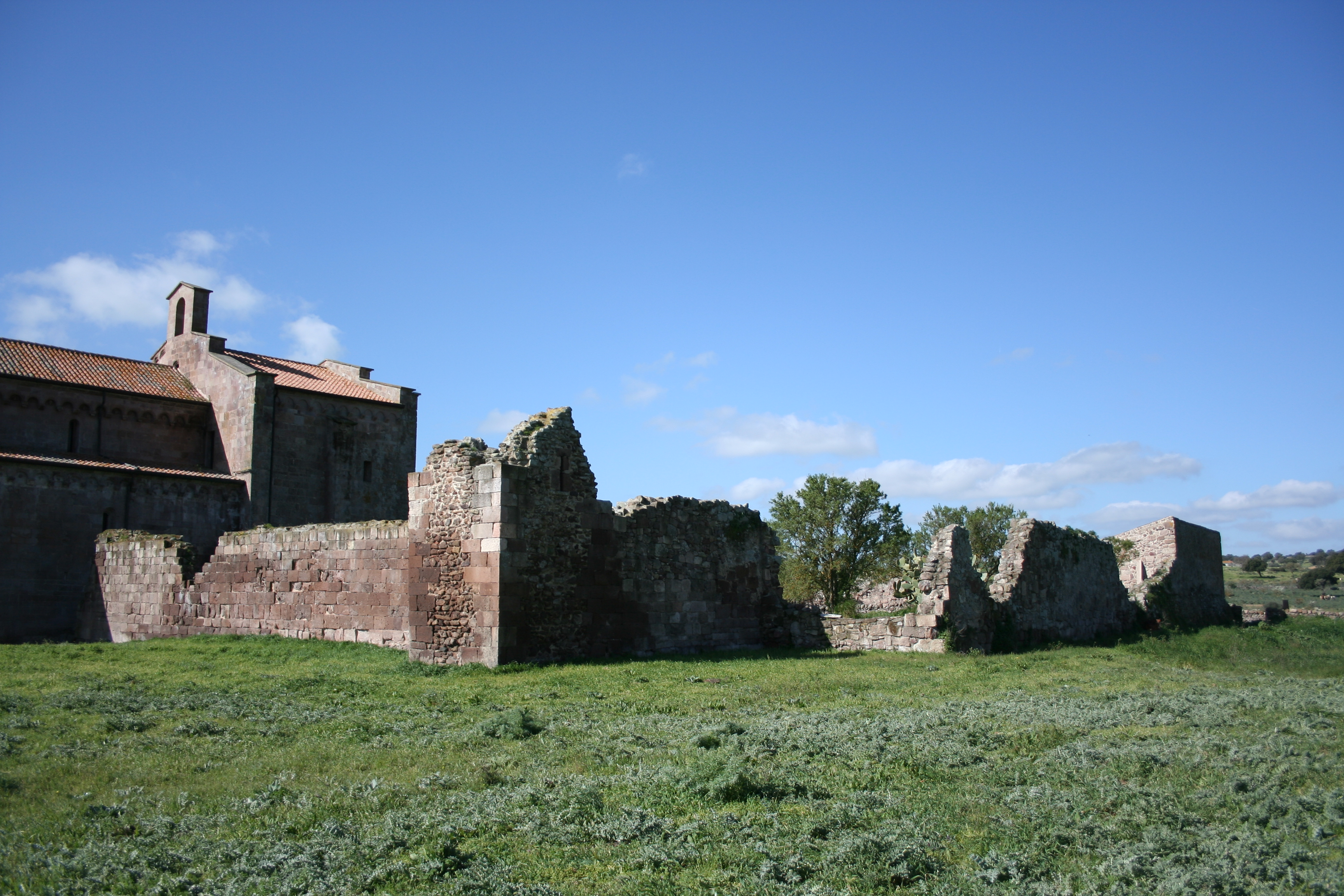 Sant'Antioco di Bisarcio (Ozieri) Veduta della chiesa e delle rovine del convento